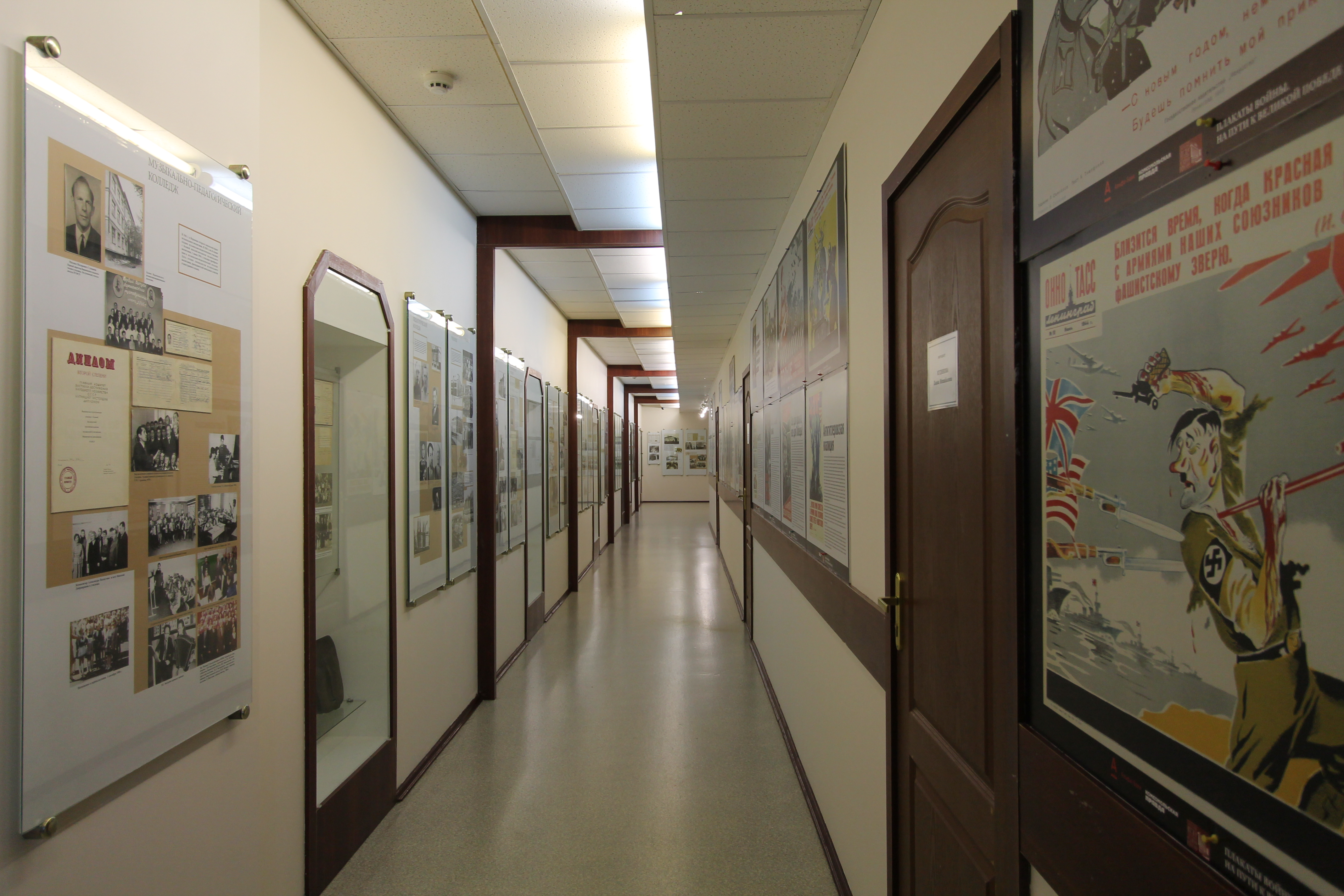 Экспозиция зала 6